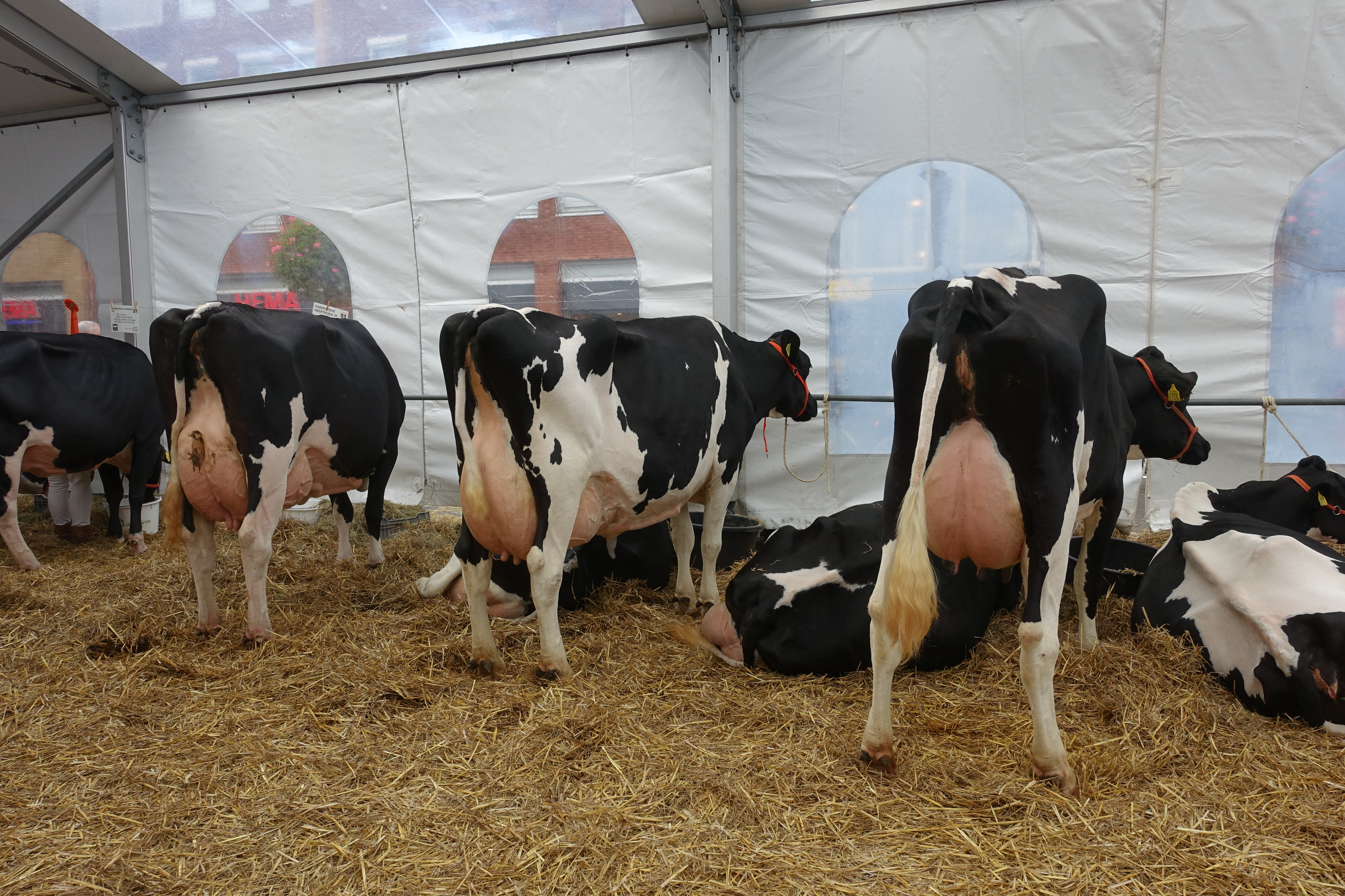 Scene in de tent op het kerkplein tijdens de Koeiemarkt in Woerden 2017